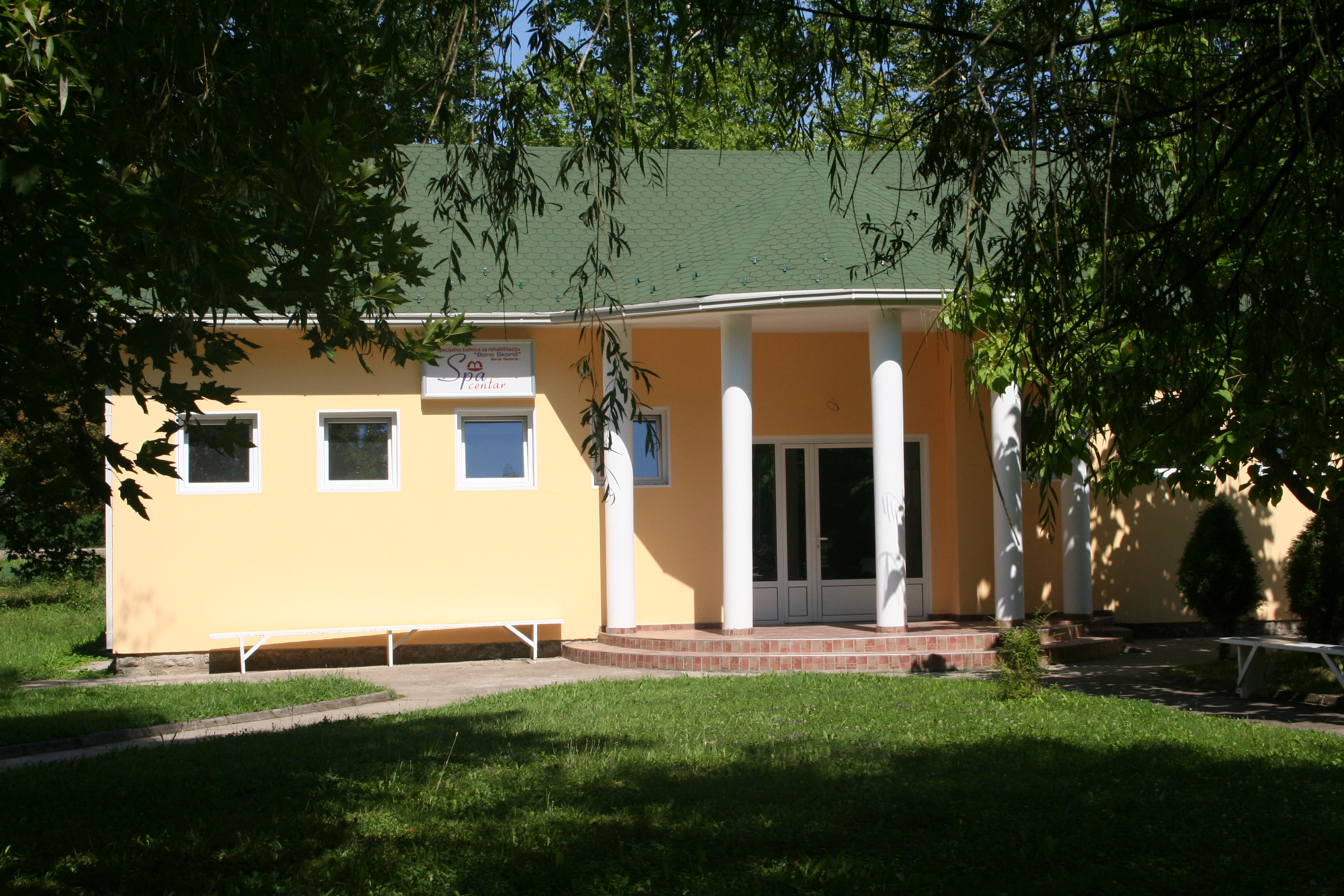 Banja Badanja